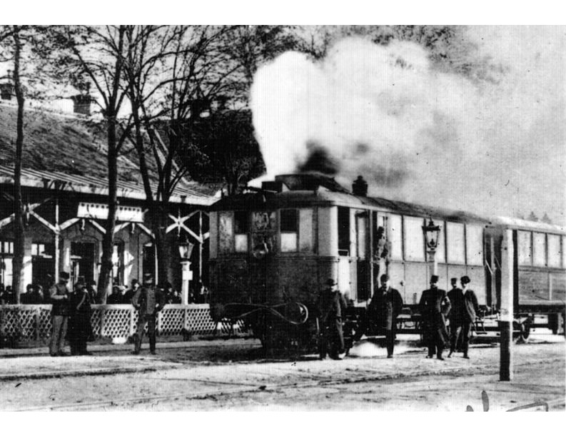 altes Postkartenbild mit einem Dampftriebwagen der Reihe BCmot VIIIb